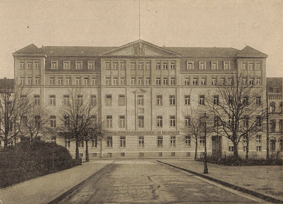 Verwaltungsgebäude der Provinzial-Feuerversicherungsanstalt der Rheinprovinz, Friedrichstraße 70/74 (am Kirchplatz), Architekt Hermann vom Endt, Foto Julius Söhn, Adressbuch Düsseldorf 1936